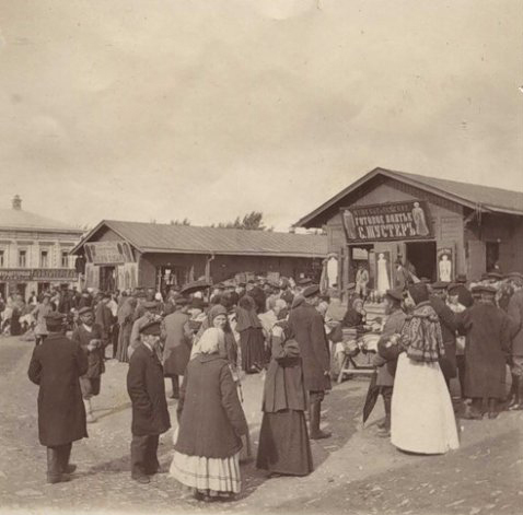 Рынок. Торговля близ павильона 'Готовое платье С. Шустер'